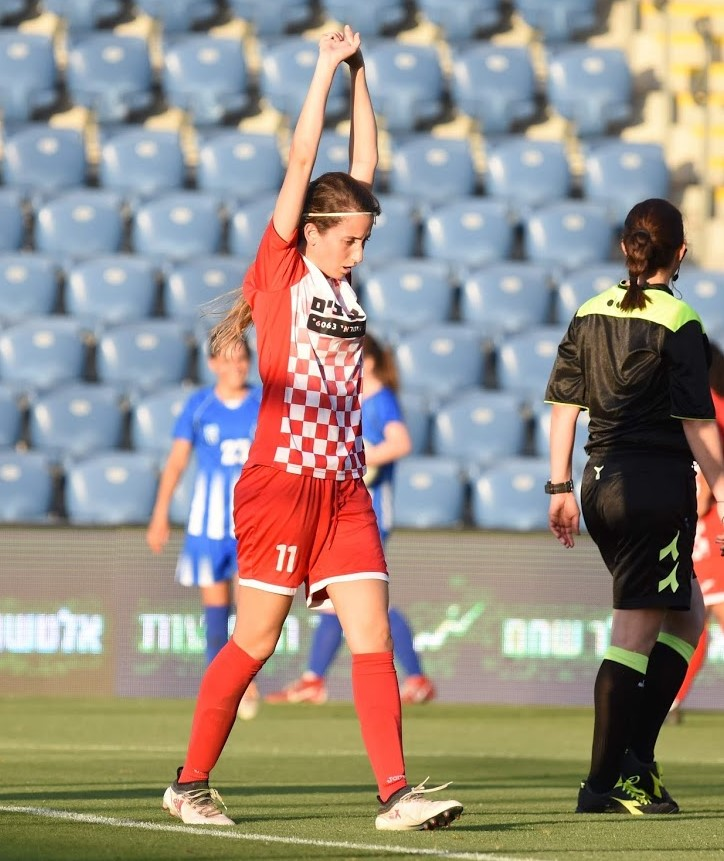 מורן פרידמן במדי מ.כ רמת השרון, 2019